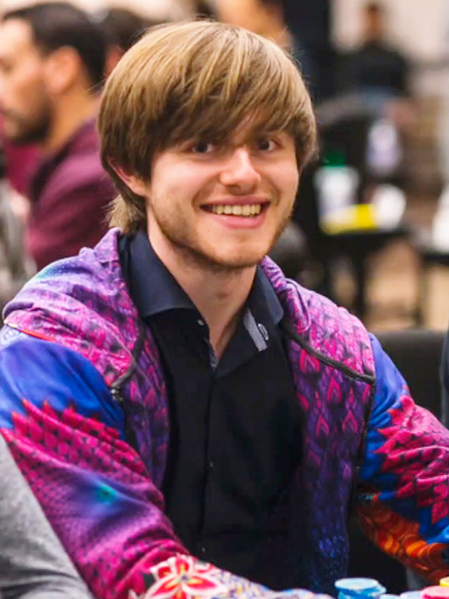 Charlie Carrel beim WPT Bay 101 Shooting Star